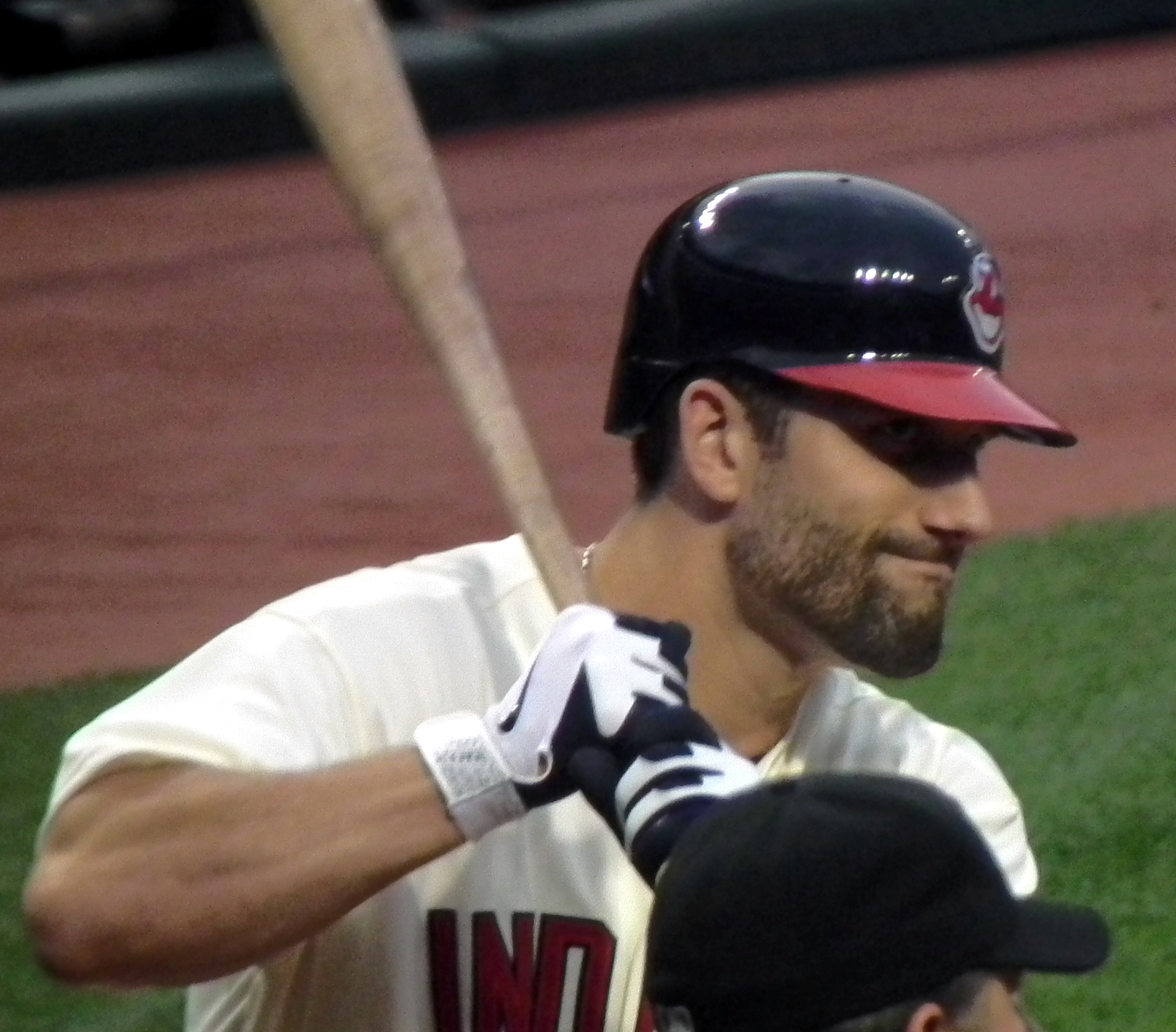 Russ Canzler